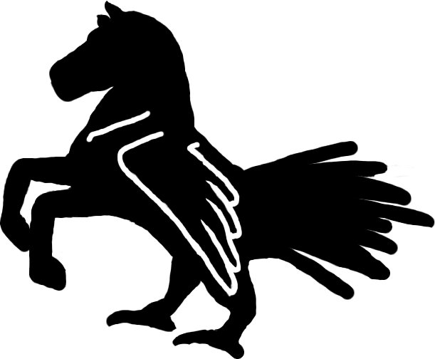 Hippalectryon, dessin sous GIMP